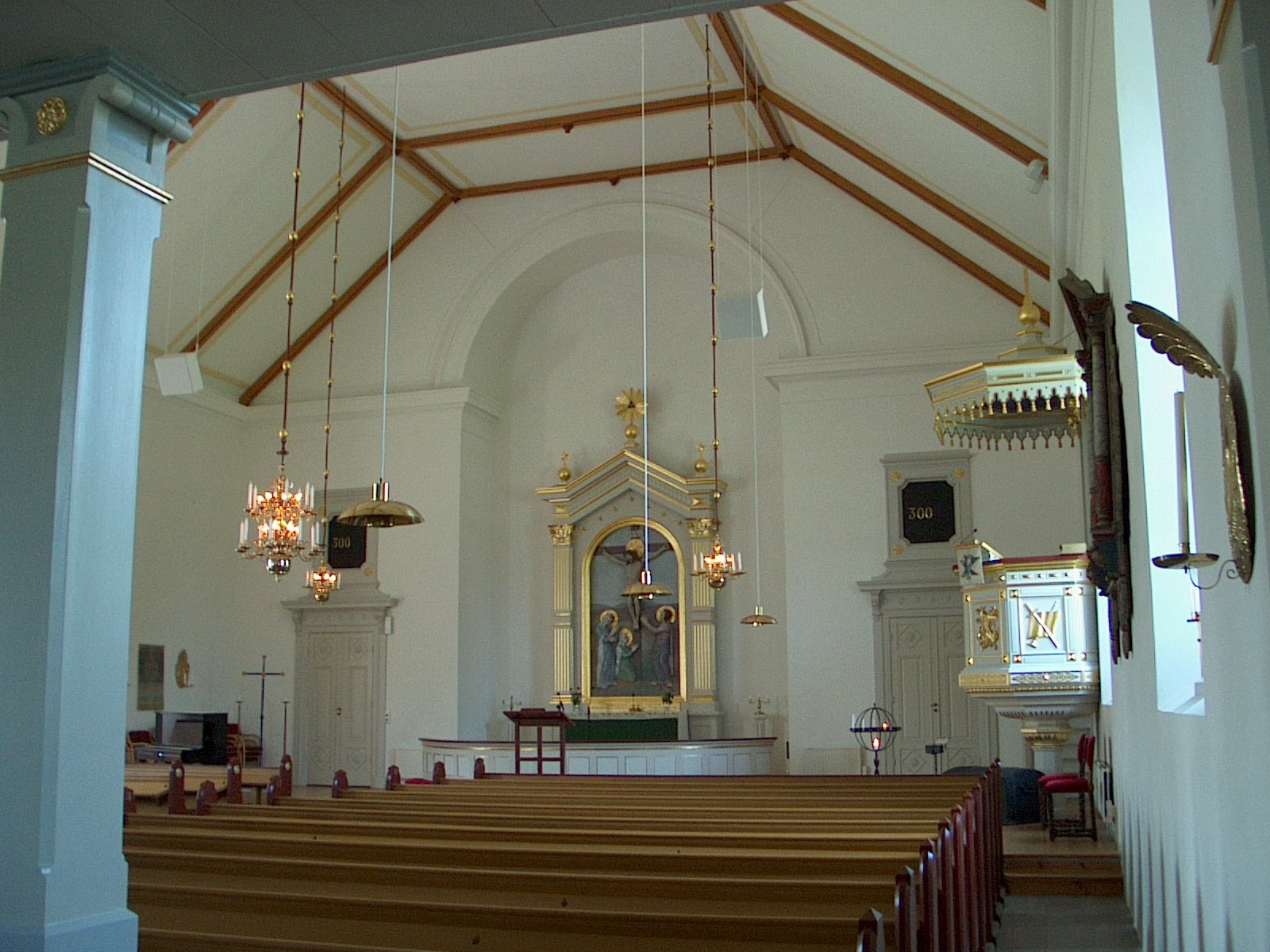 Högby kyrkas interiör.